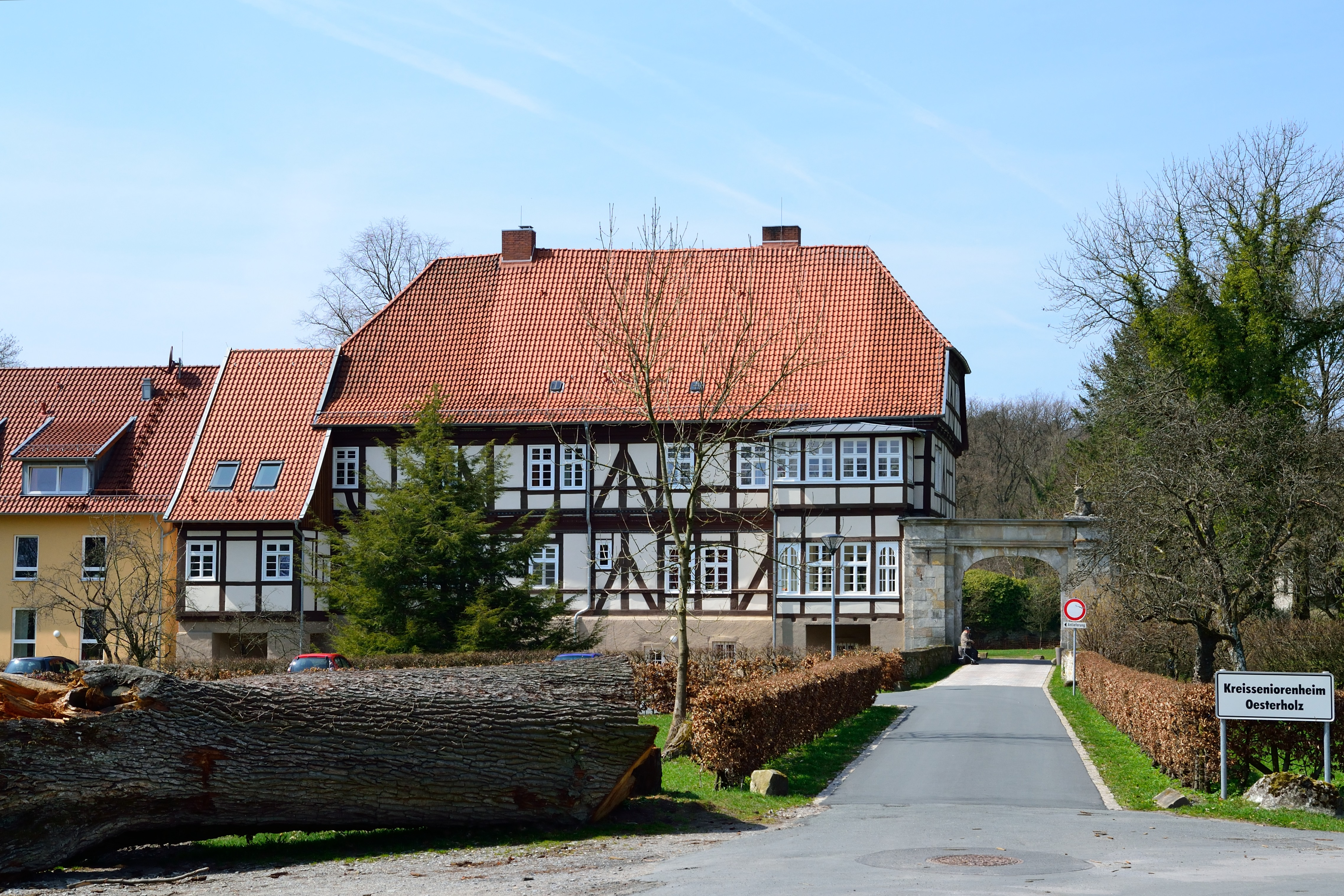 This is a photograph of an architectural monument. ehemaliges Jagdschloss Oesterholz, heute Kreisaltenheim